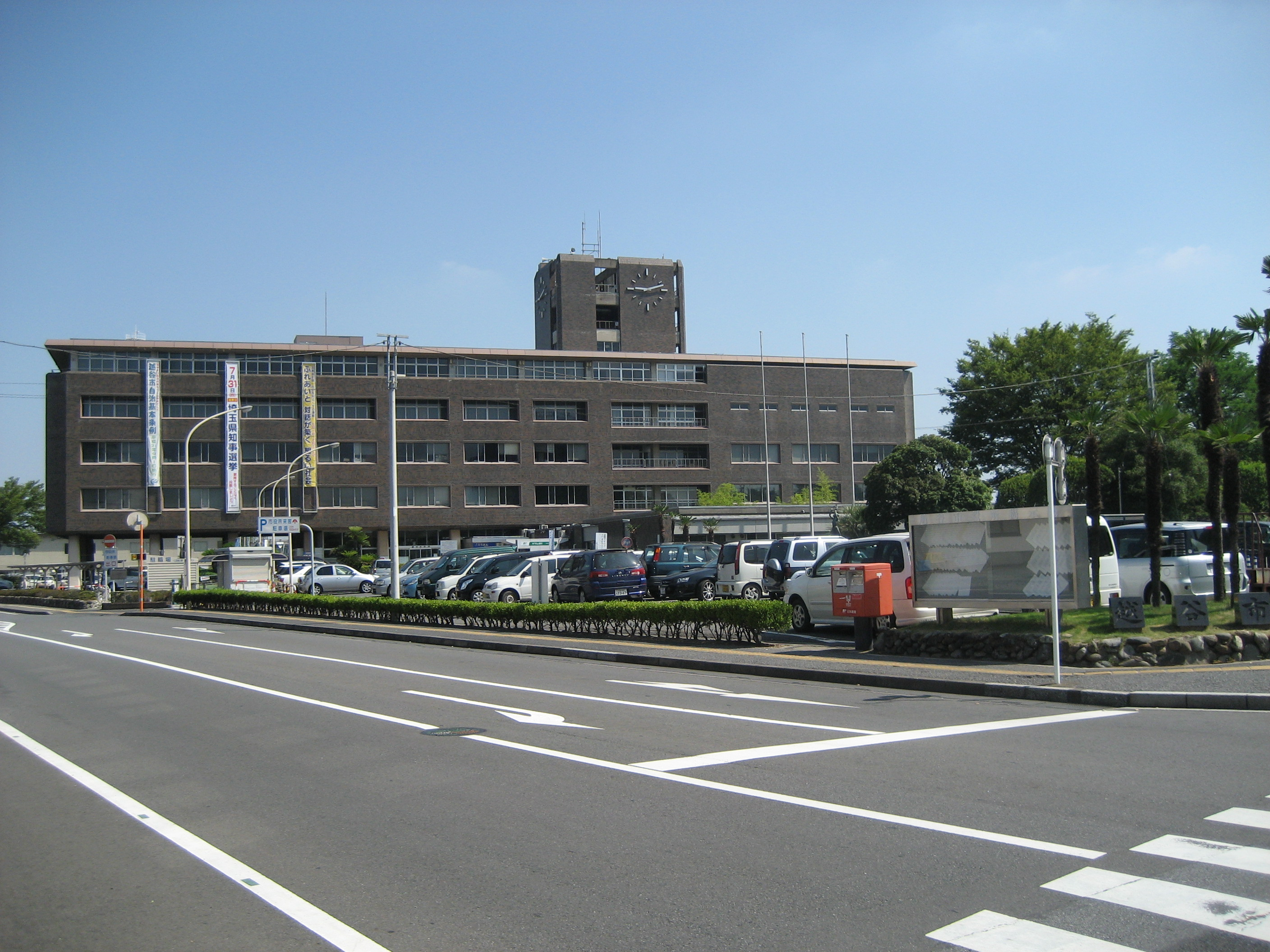 越谷市役所庁舎